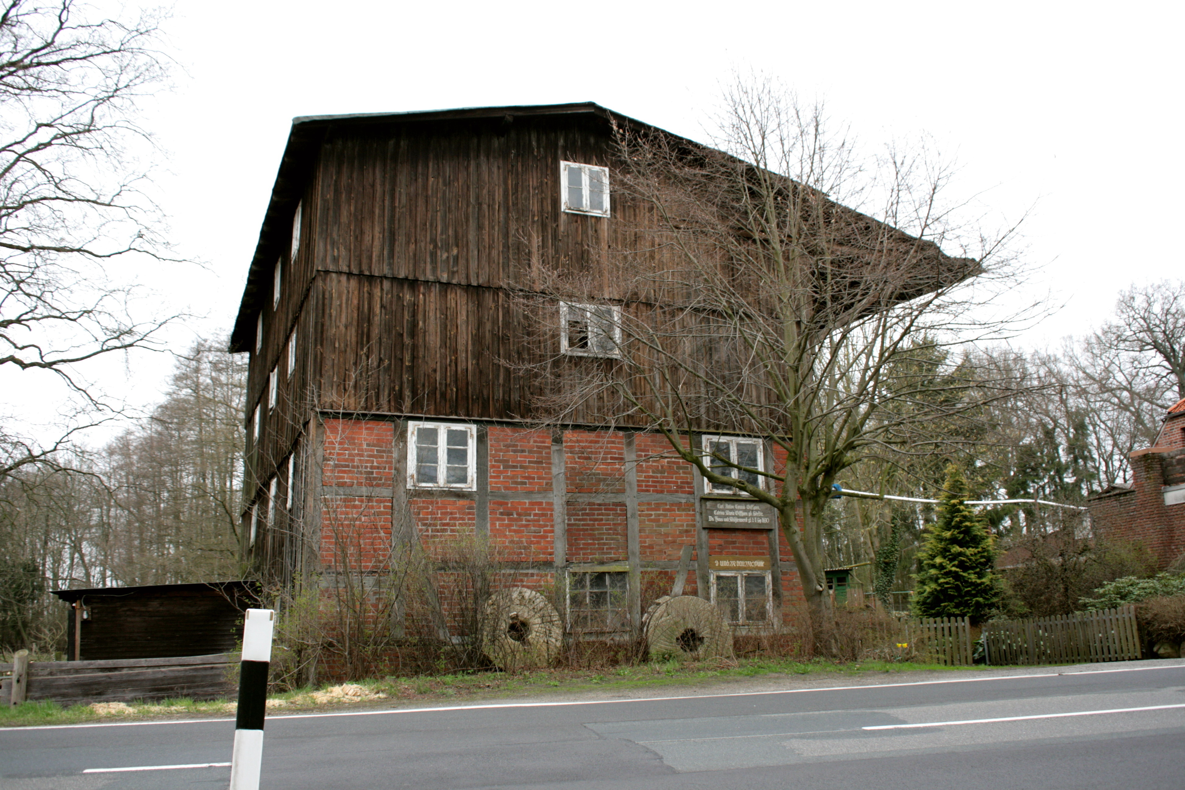 Neumühle Borg neben (ehemals an) der Wipperau, Neumühle (Bundesstraße 191) in Rosche